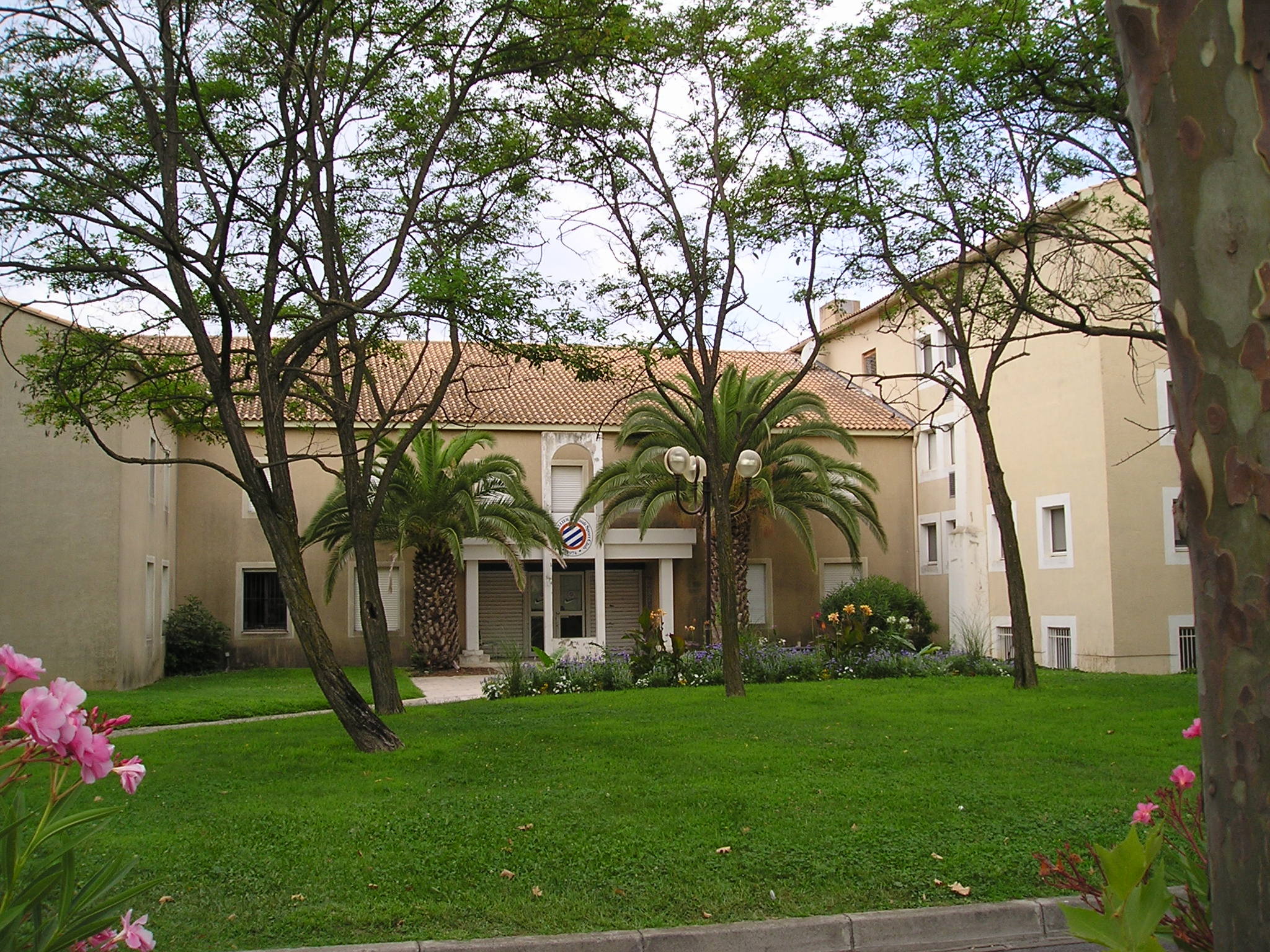 Le siège du club de football Montpellier Hérault Sport Club, au domaine de Grammont où les joueurs s'entraînent, à l'est de Montpellier.